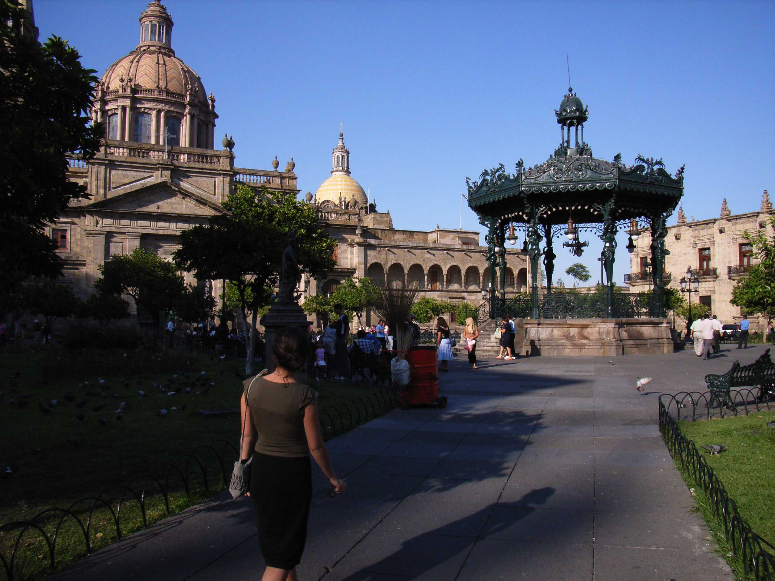 Plaza de Armas y Catedral de Guadalajara